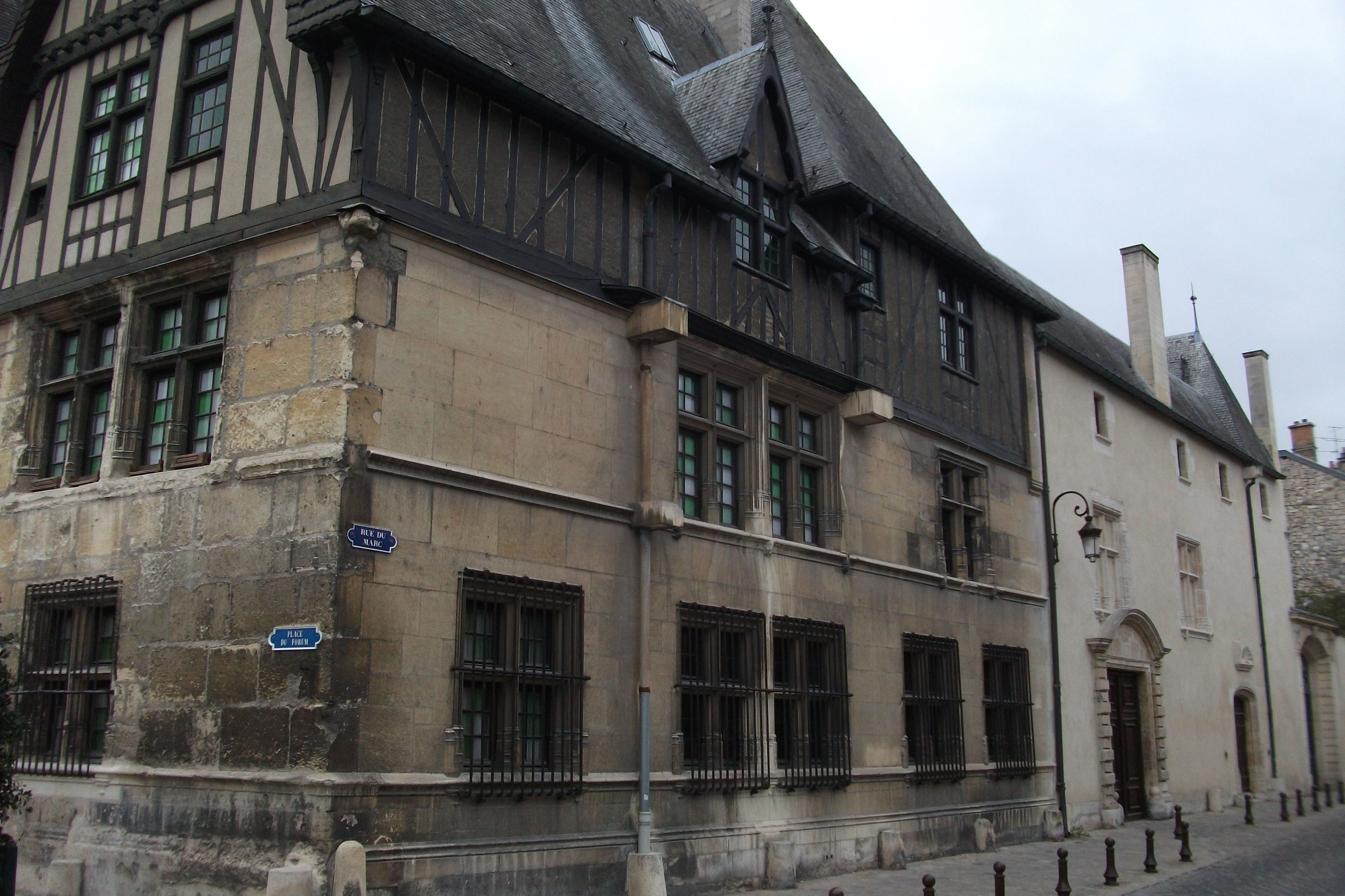 Musée de l'hôtel le Vergeur, façade à l'angle rue du Marc et place du Forum.